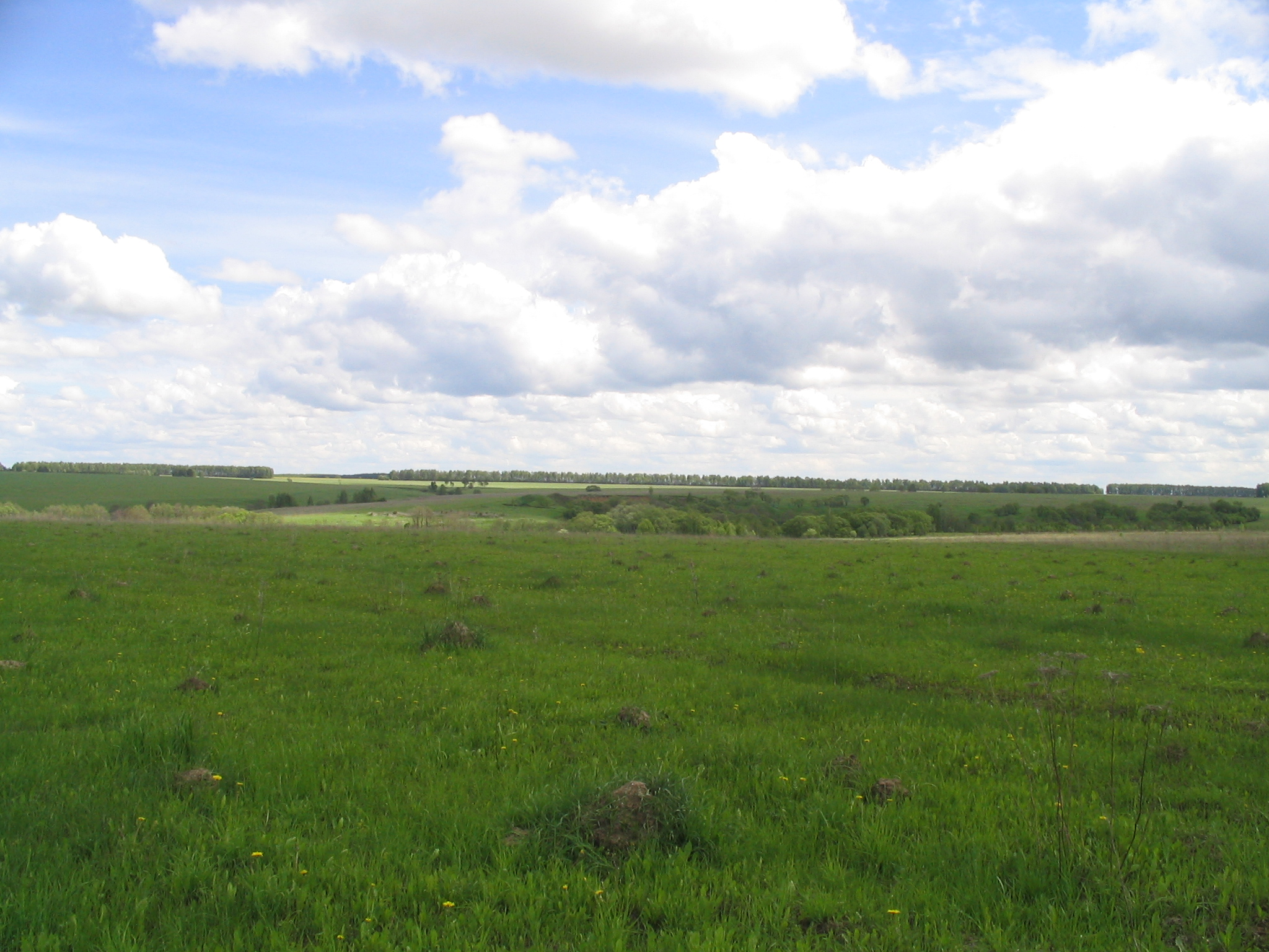 Местность в районе г. Ясногорска (Тульская обл.)